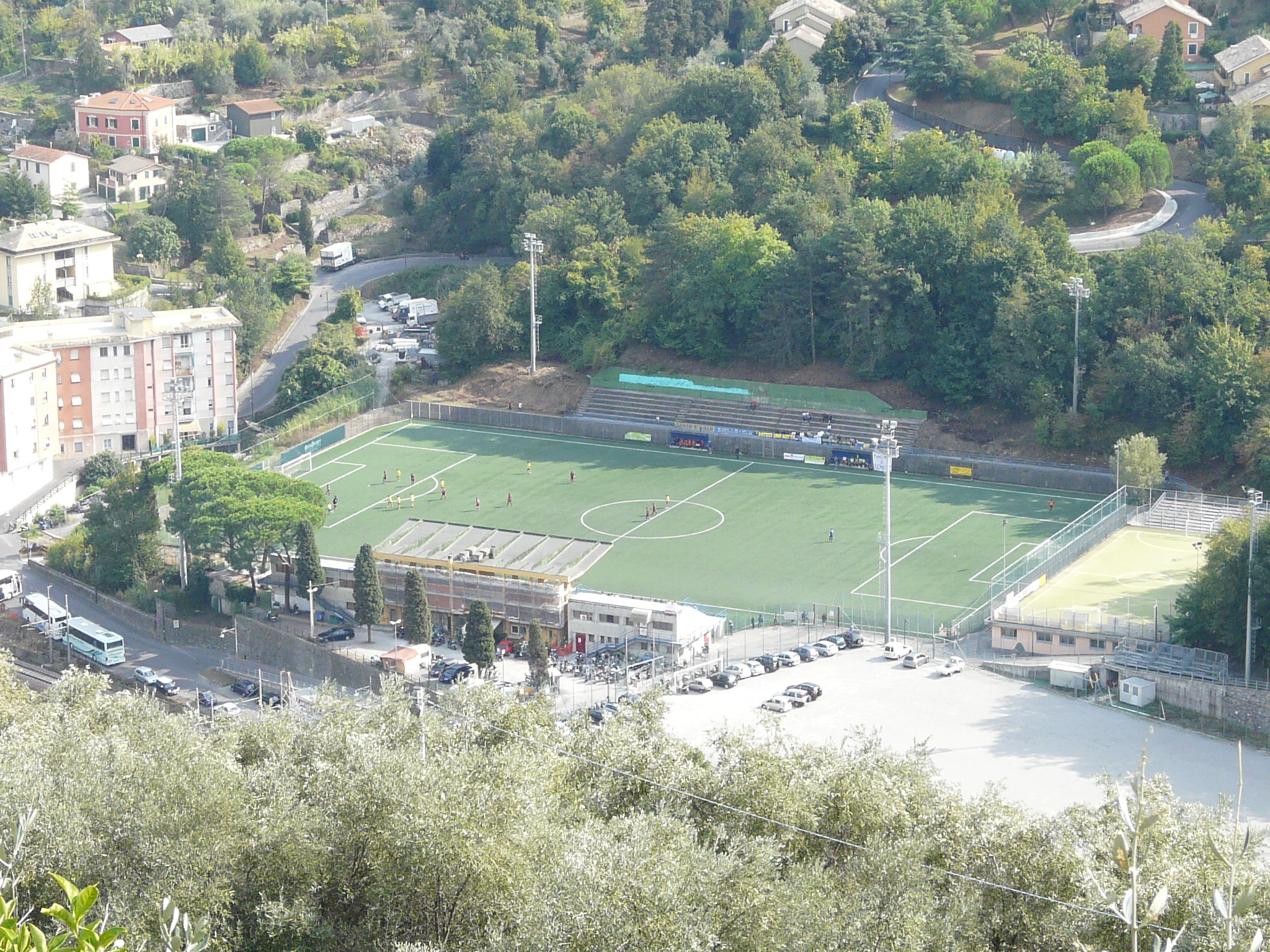 Il Campo sportivo "Broccardi" di Santa Margherita Ligure, Liguria, Italia